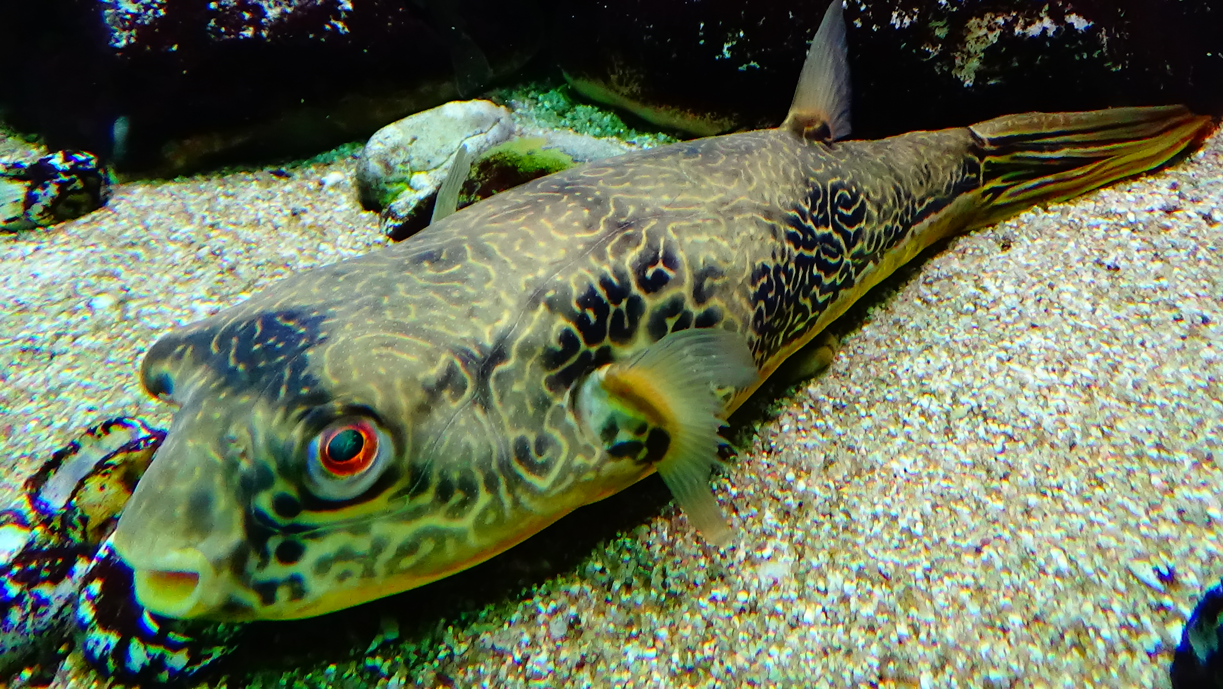 Tetraodon mbu - Aquarium tropicale du palais de la porte dorée, Paris, Ile de France, France - 12/2014